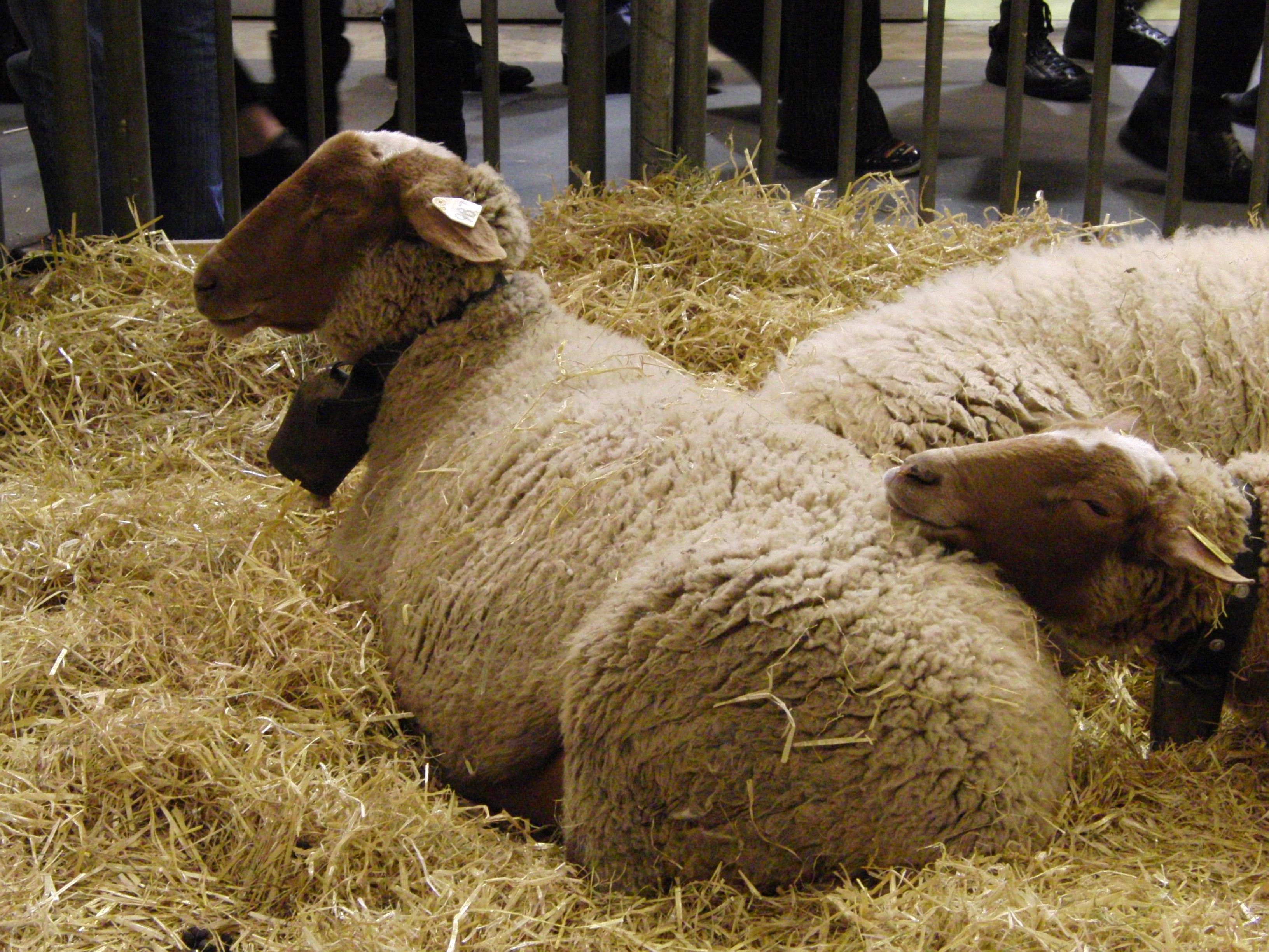 Brebis Rouge du Roussillon - Salon international de l'agriculture 2013, Paris, France